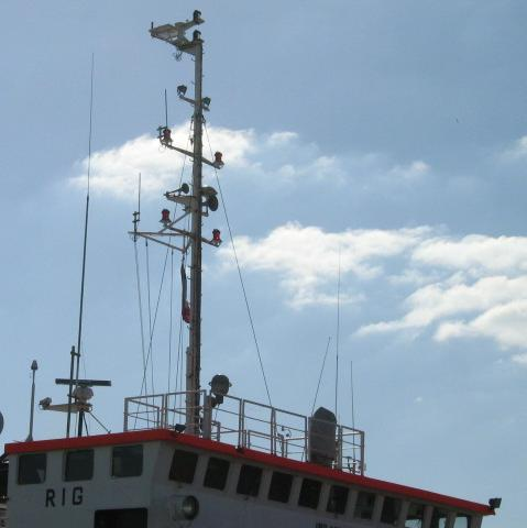 antennes de navire de commerce pour la Zone A1 et A2 SMDSM.